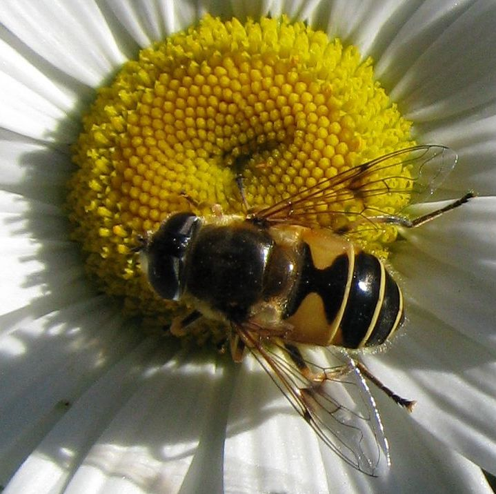 Hagedroneflue Eristalis lineata hunn.Template:Byline